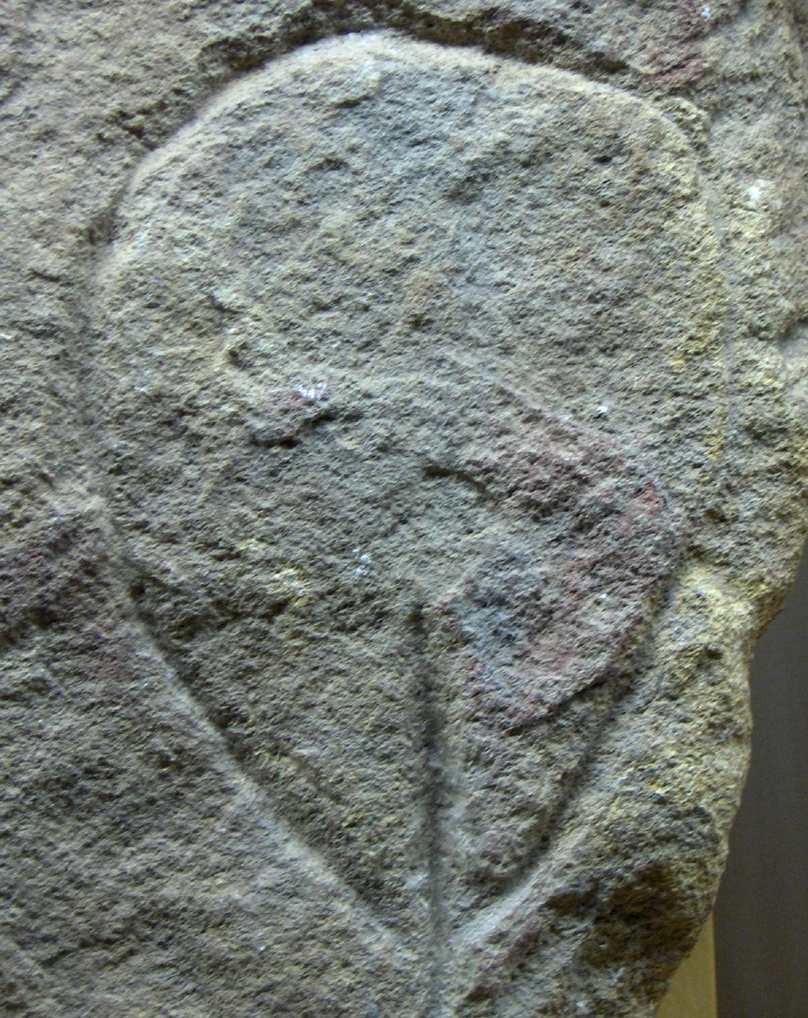 Vulve stylisée, pierre, paléolithique, Musée des antiquités nationales, Saint-Germain-en-Laye